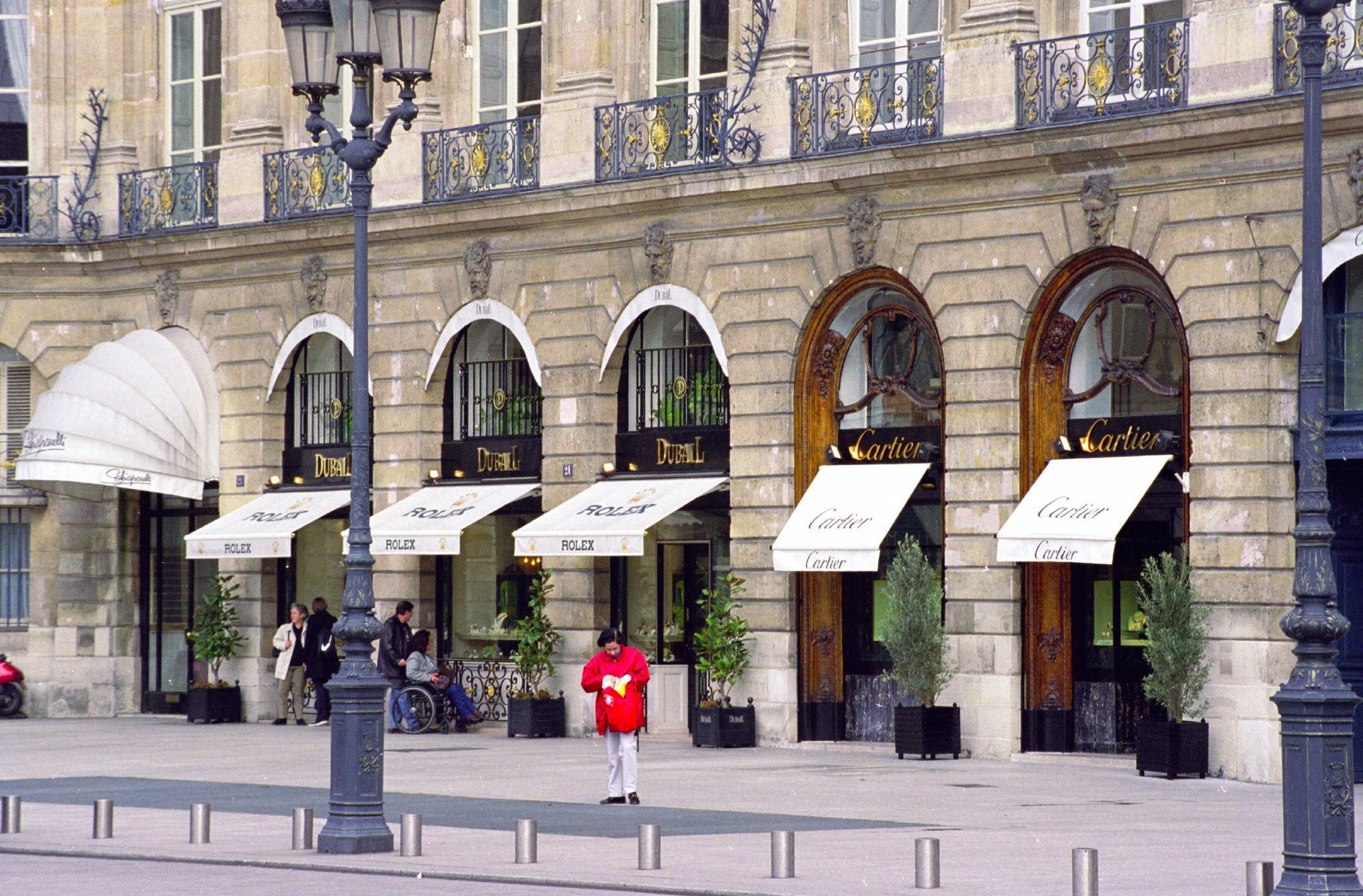 Place Vendôme, Paris